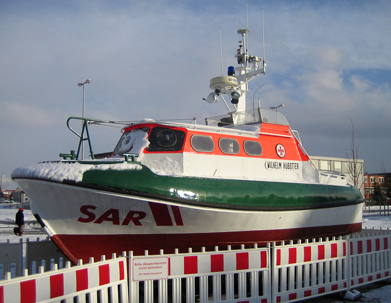 SRB Wilhelm Hübotter in Bremen, Walle. 18. Dezember 2005, 12:37 Uhr.